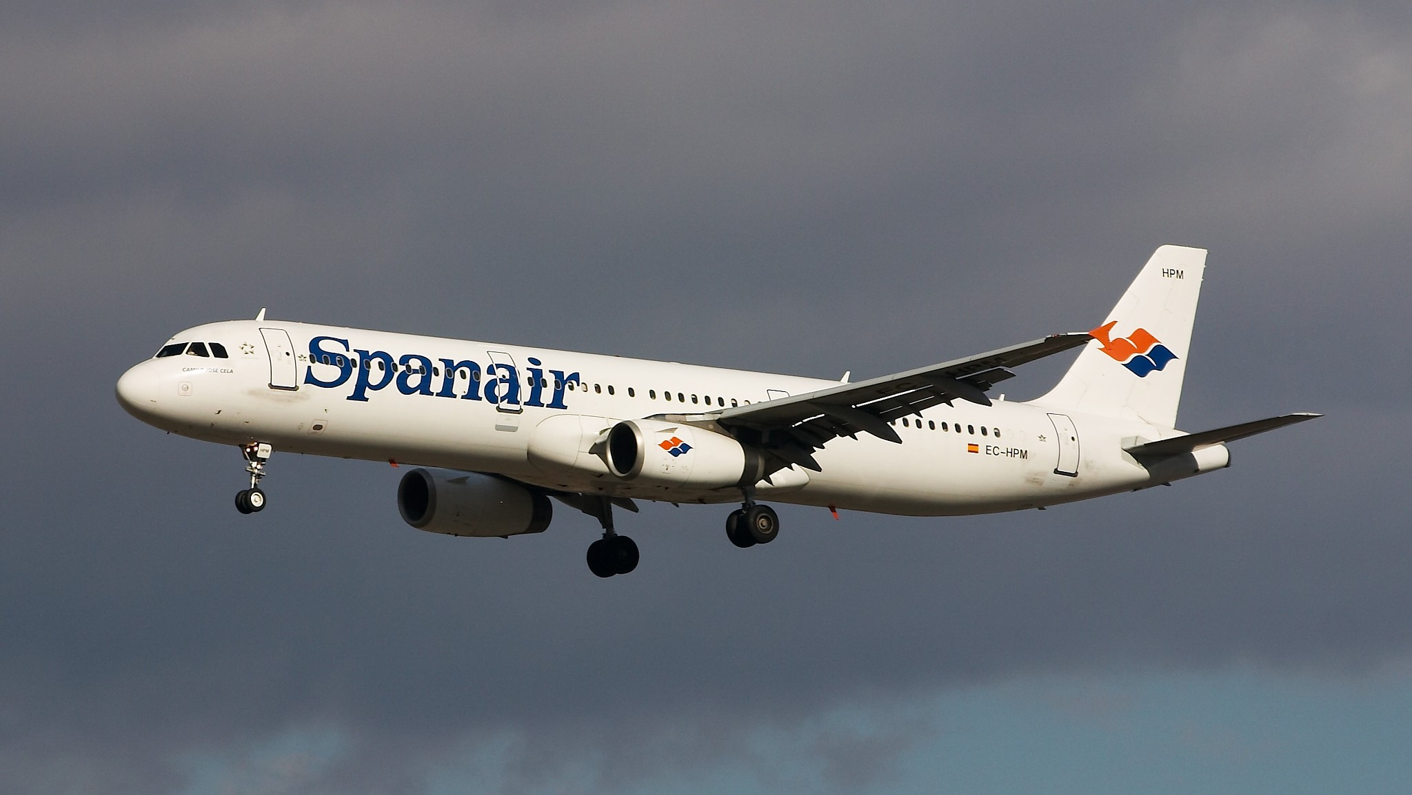 Airbus A321-231 de Spanair a punto de aterrizar en la pista 33 del aeropuerto de Madrid Barajas.